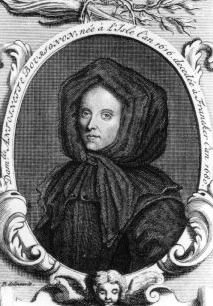 Antoinette Bourignon (1618-1680), scrittrice mistica fiamminga